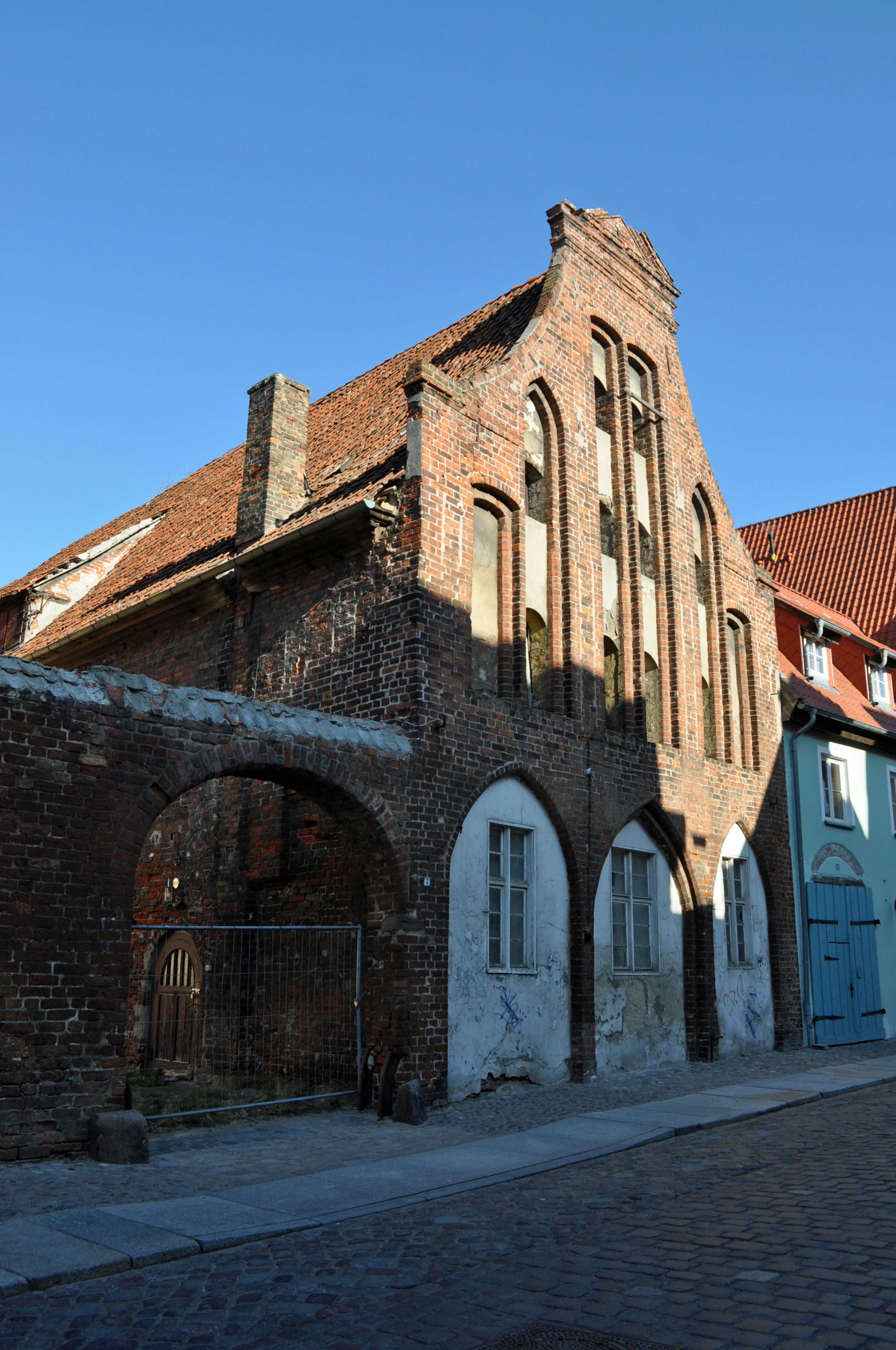 Gebäude bzw. Gebäudedetail in Stralsund. Straße und Hausnummer siehe Dateiname.